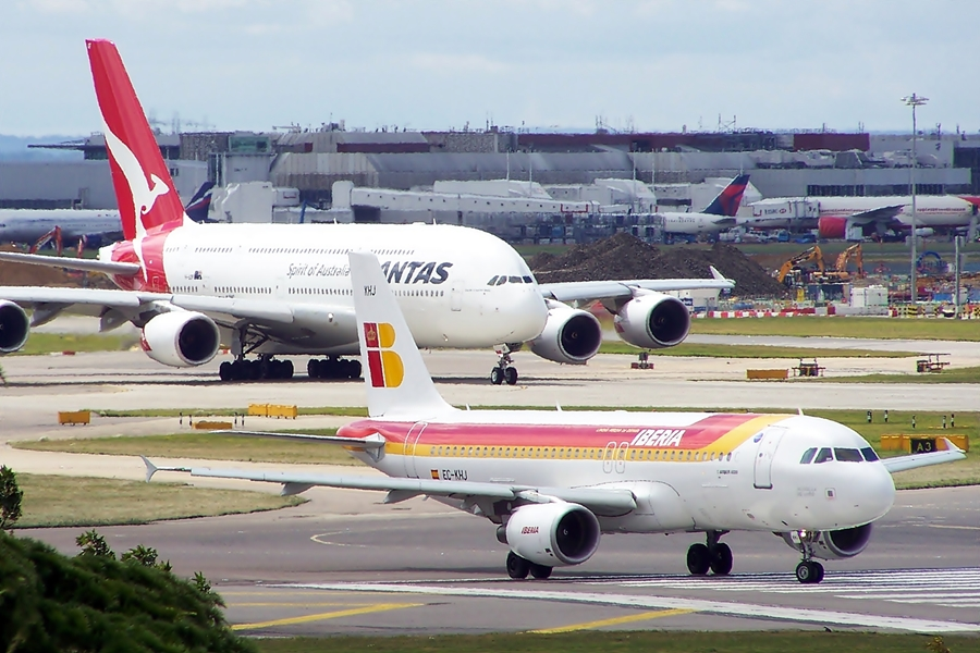 EC-KHJ A320 Iberia